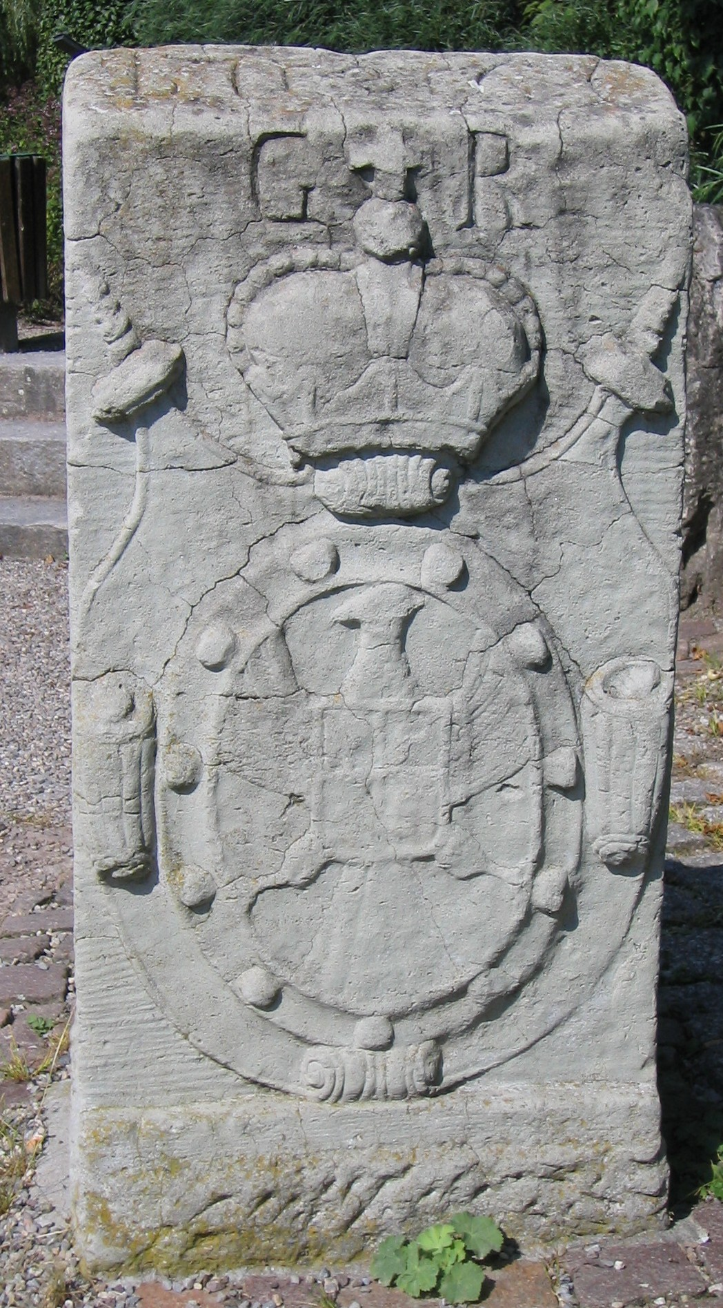 Grenzstein zwischen Josef Wenzel zu Fürstenberg (1762-1983 - Fürstenhaus Fürstenberg) und Fürstabt Martin Gerbert (Kloster St. Blasien) aus dem Jahr 1767